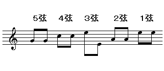 afinacion de charango チャランゴの調弦